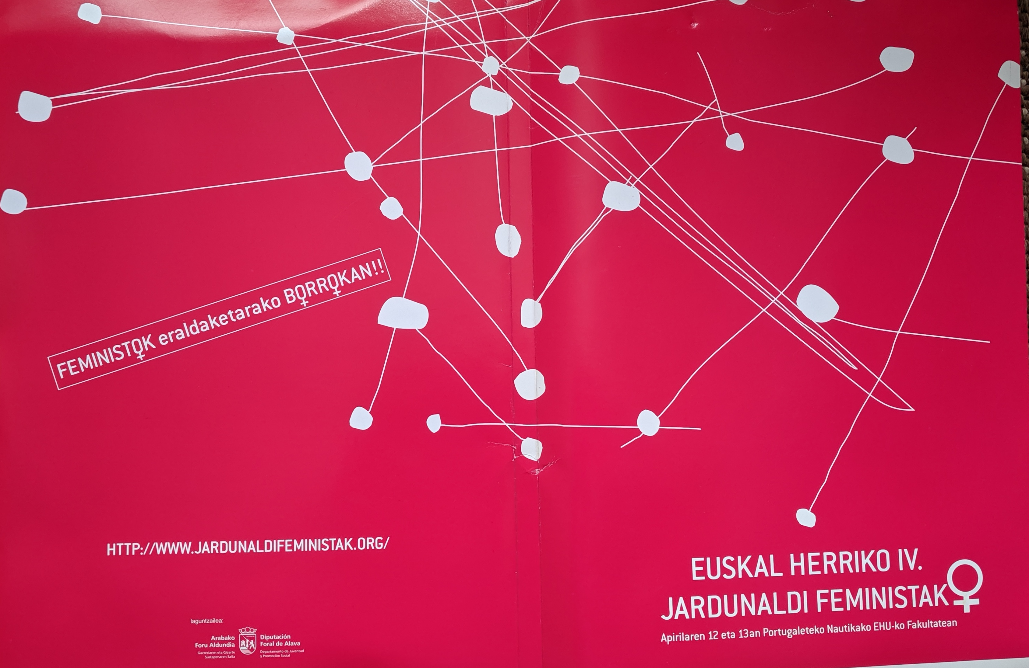 2008ko apirilaren 12 eta 13an burutu ziren Portugaleten UPV/EHUko Nautika Eskolan (Bizkaia) eta 1.300 bat emakumek hartu zuten parte.